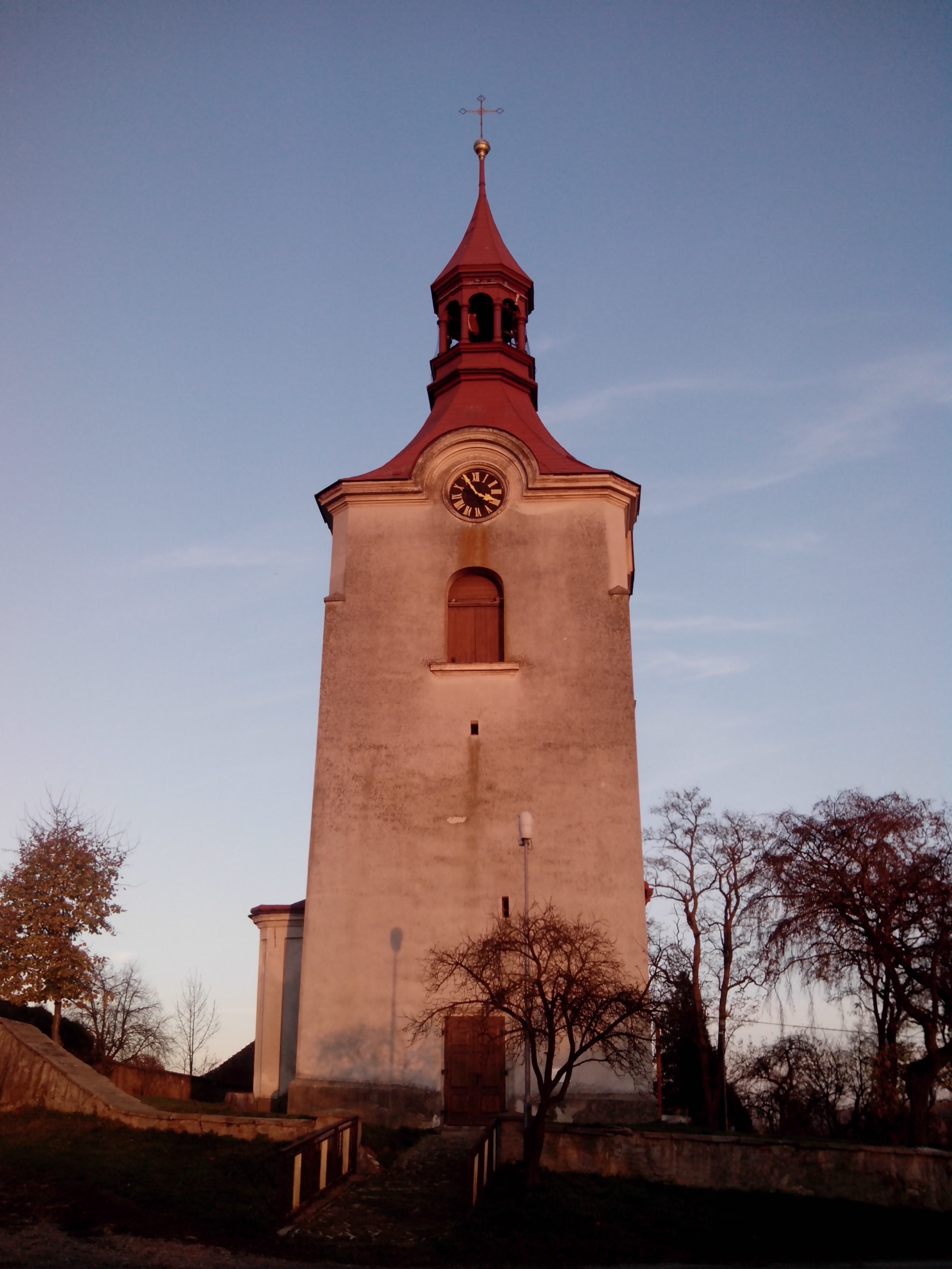 Kostel sv. Václav v Číbuzi